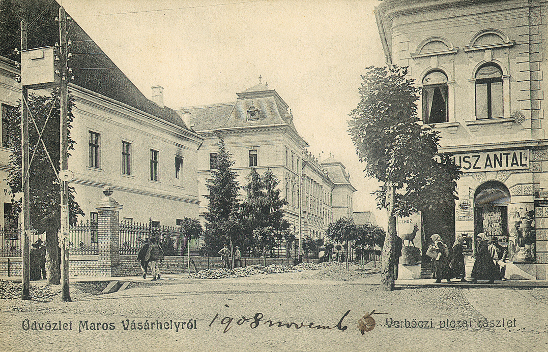 Marosvásárhely, 1908